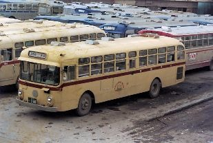 交通方法変更前の沖縄バス。